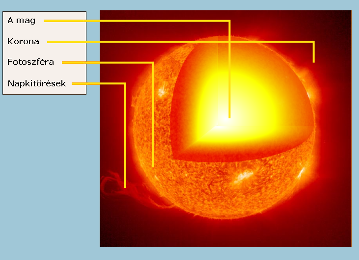 A Nap szerkezete